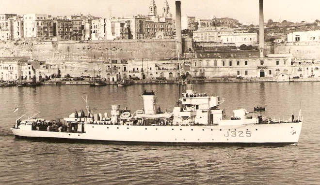 א.ה.מ. פרובידנס בנמל וולטה 1946